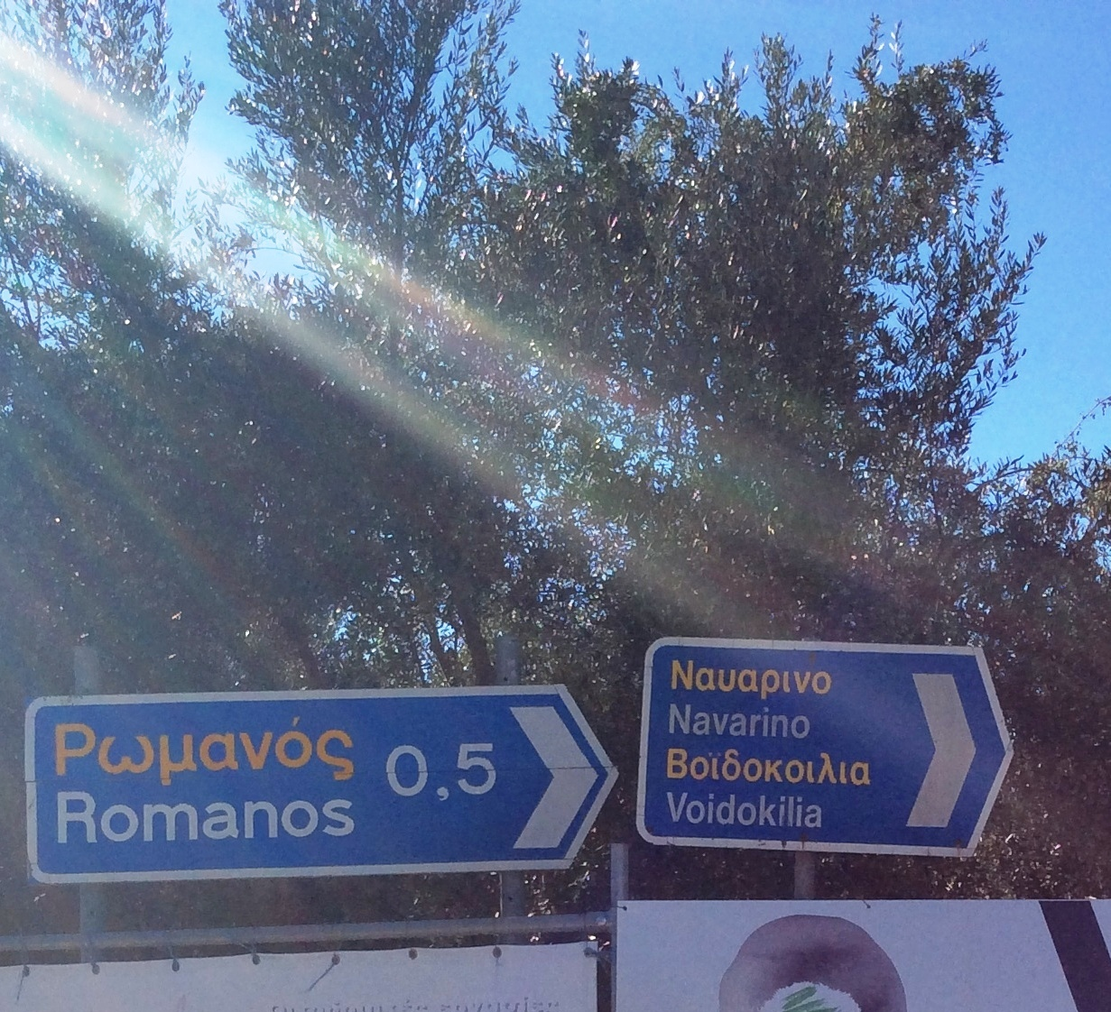 Ρωμανός Μεσσηνίας